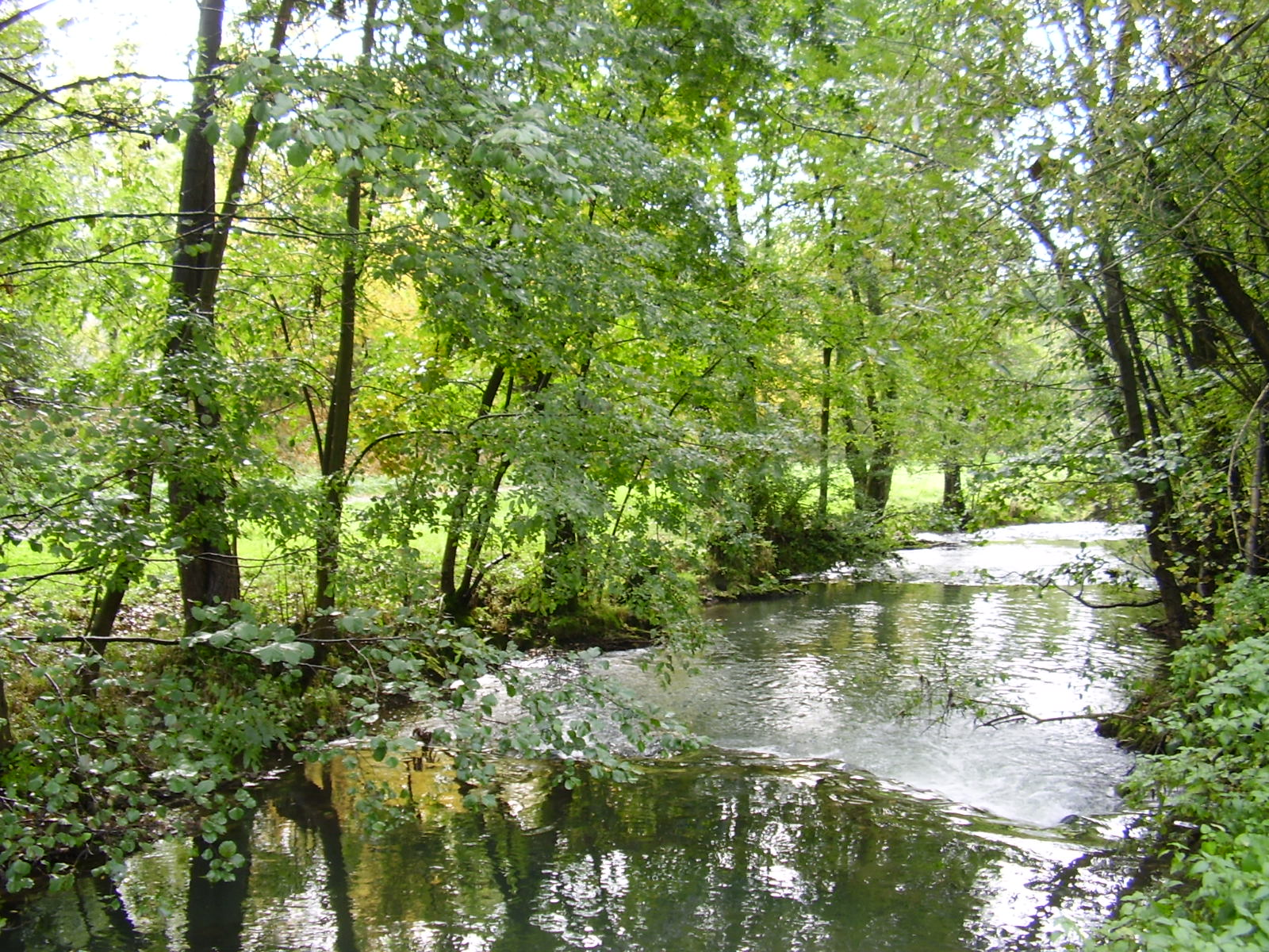 Kirnau hält auf die Seckach zu. Aufnahme kurz vor Adelsheim.